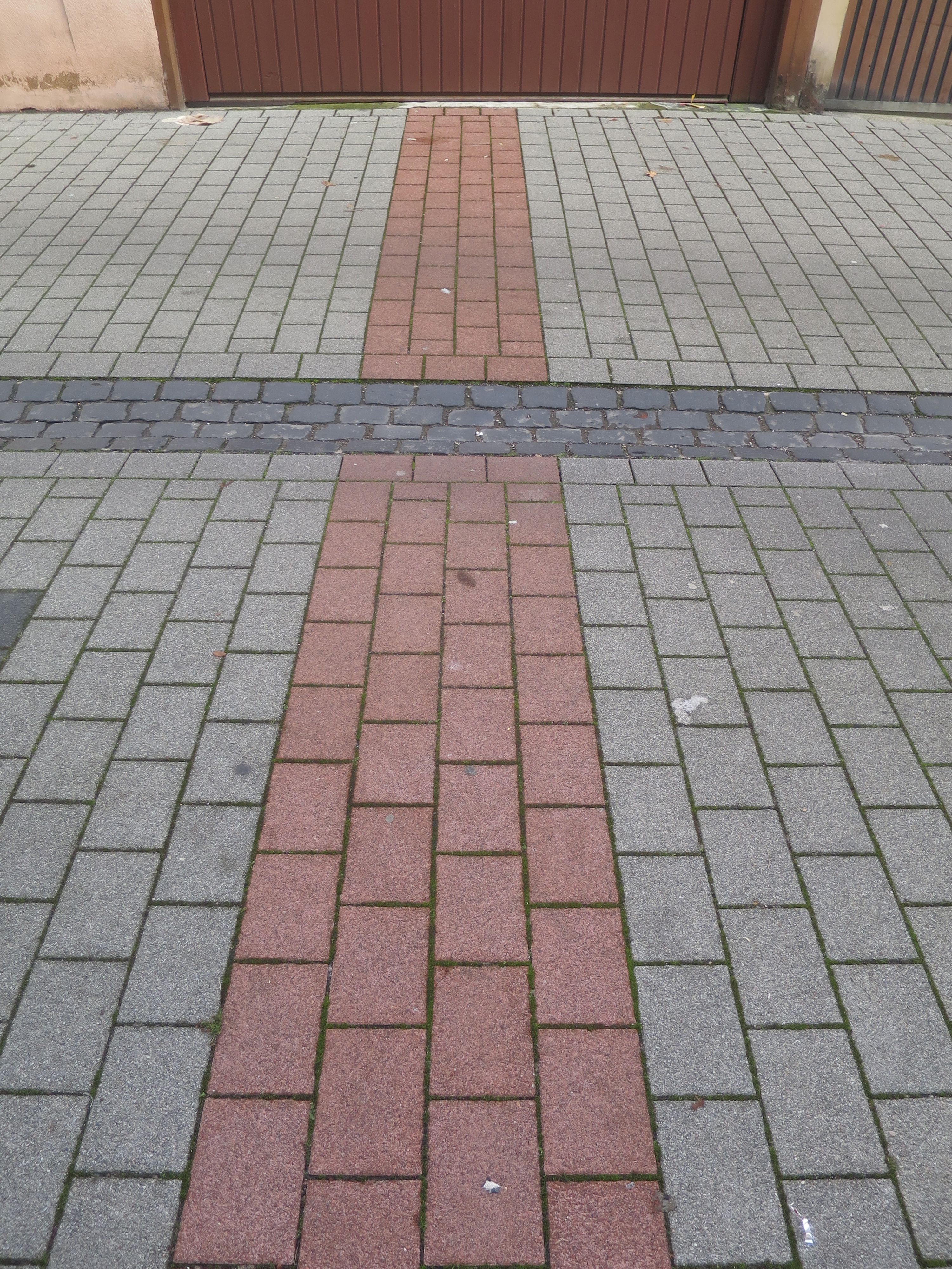 Pflasterung des Verlaufs der Stadtmauer in der Wollstraße, Worms